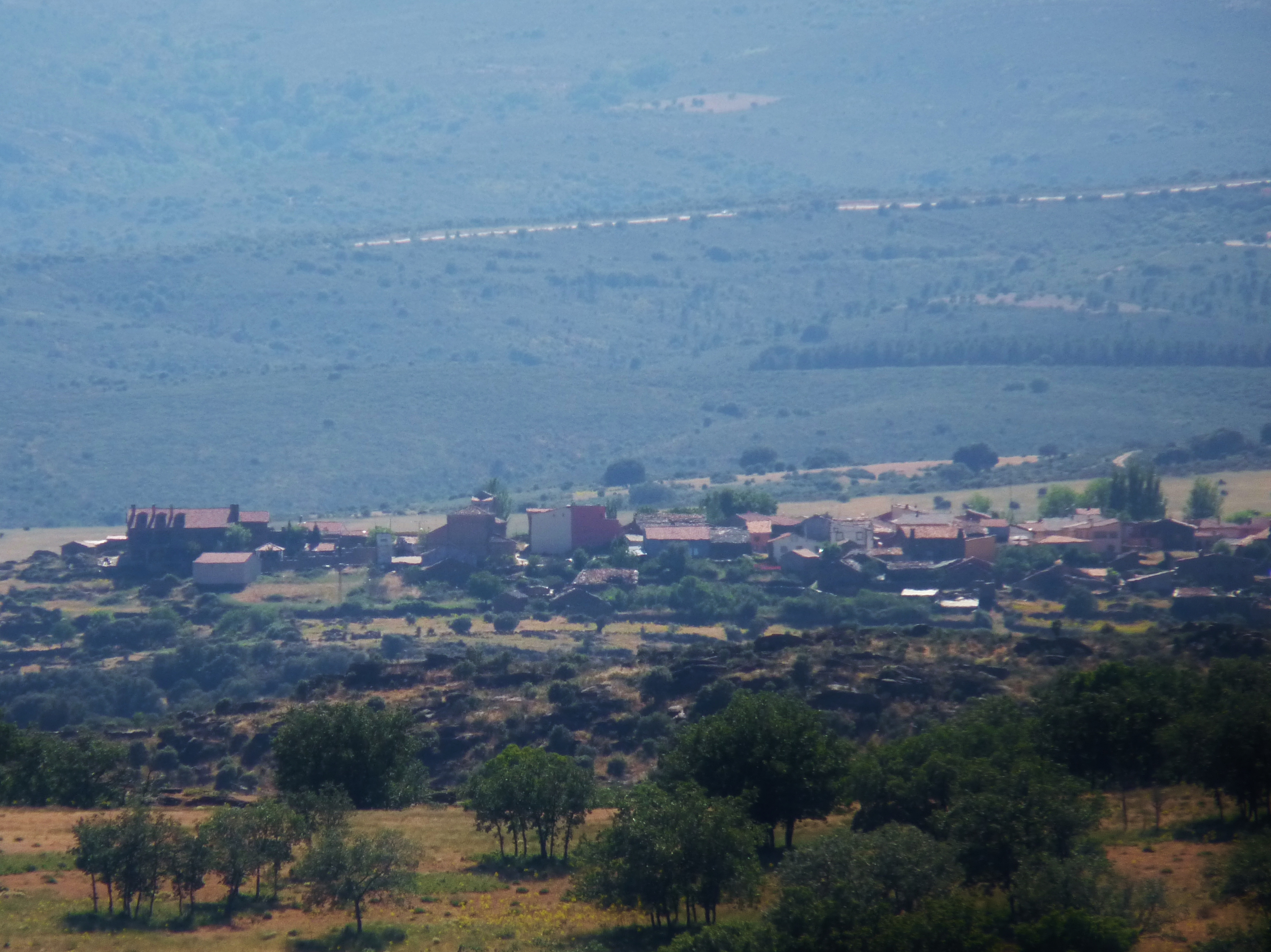 View of Zarzuela de Jadraque, Guadalajara, España